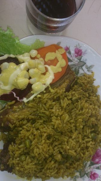 Arrosito con pato